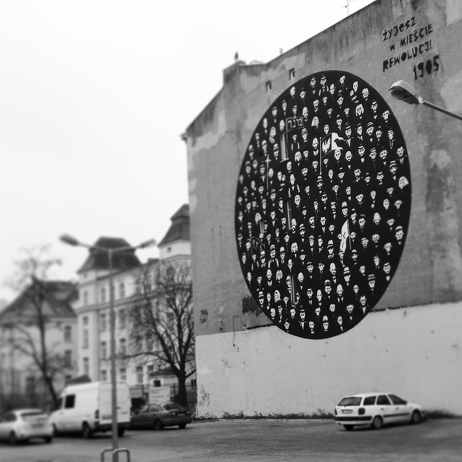 Mural poświęcony Rewolucji 1905 roku w Łodzi, wykonany przez grupę Takie Pany, rok 2015.